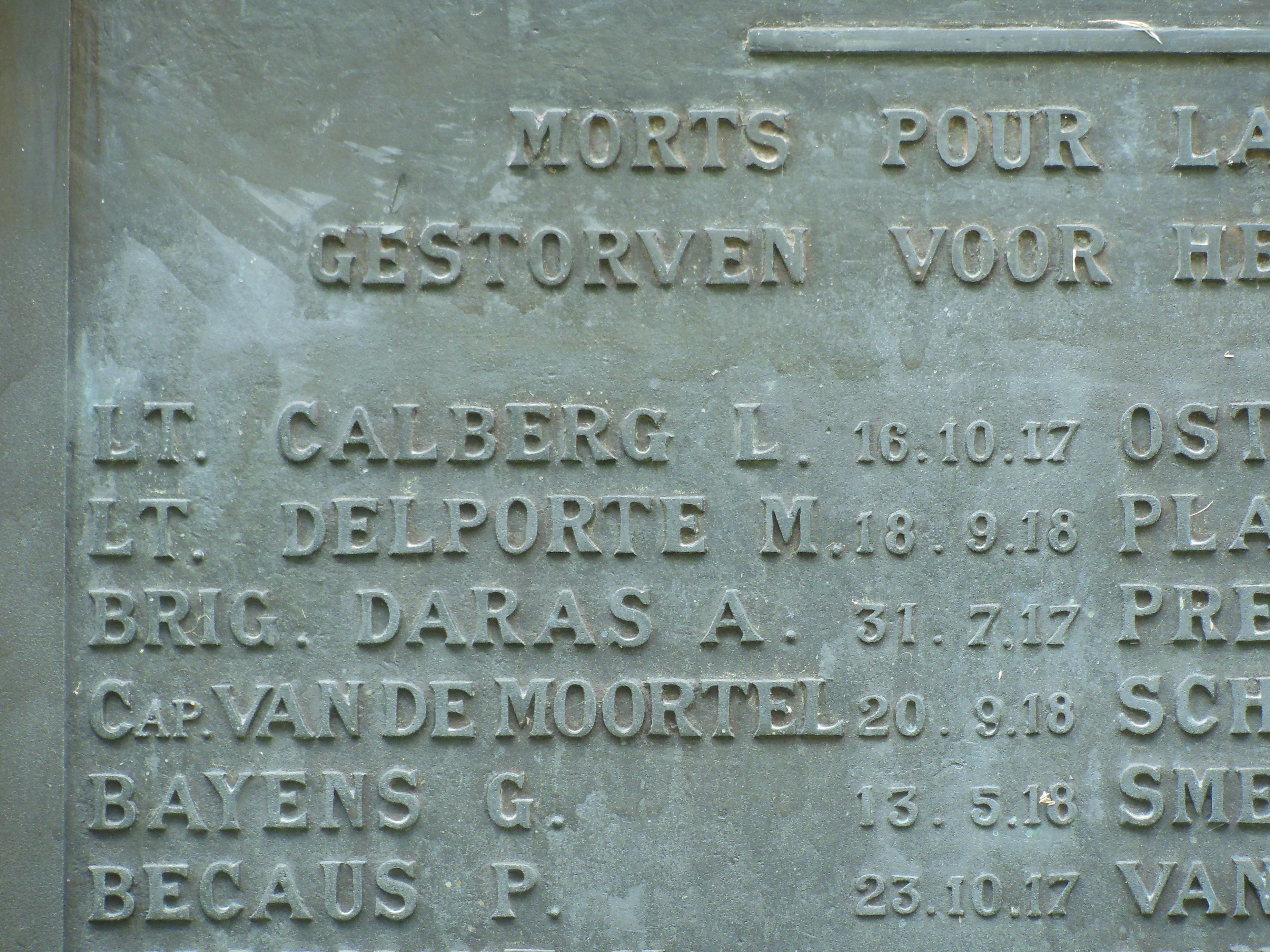 Lt Calberg L. vermeld op de gedenkplaat van de Compagnie Sapeurs-Pontonniers, gestorven 16-10-1917